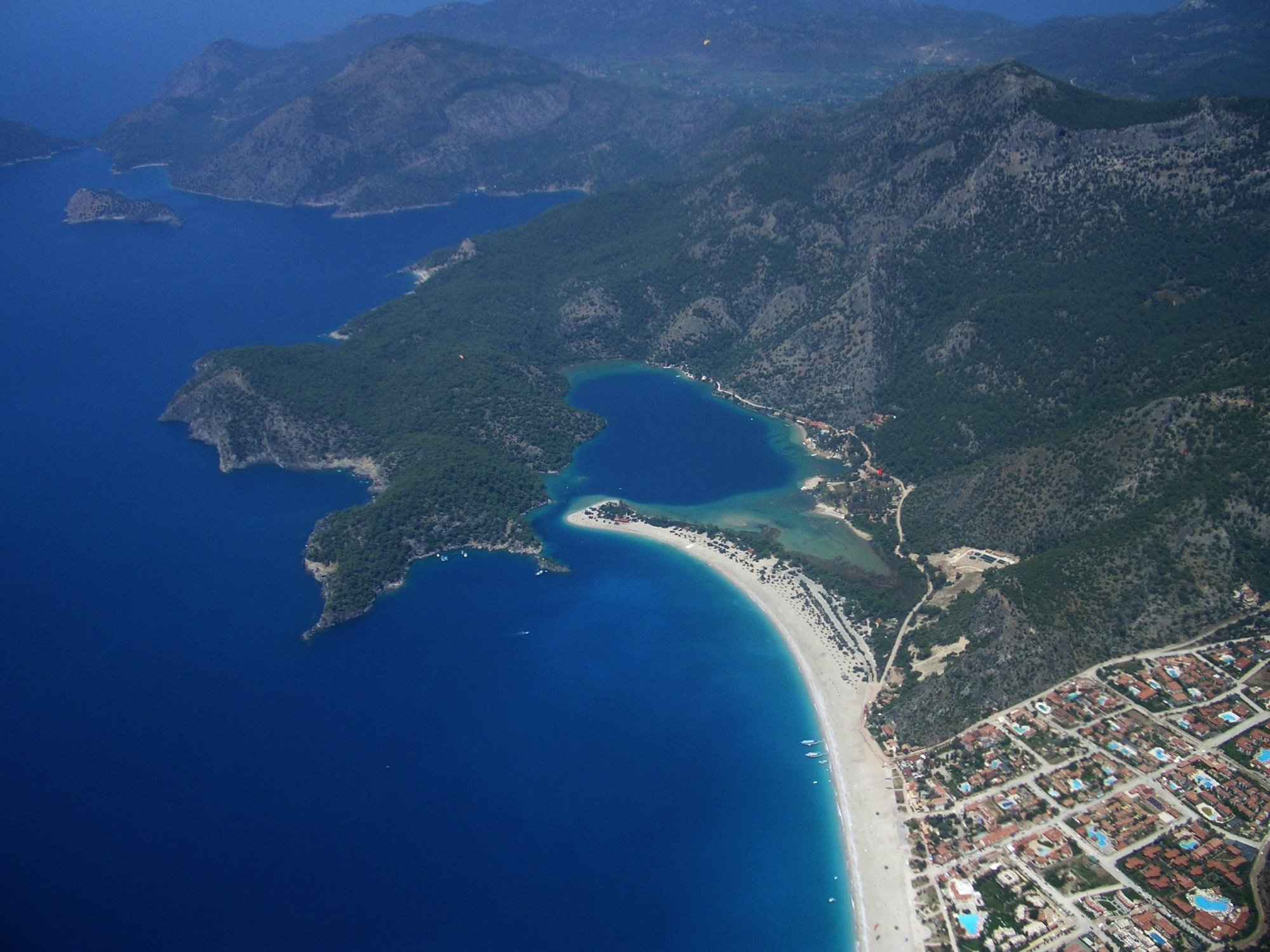 Oludeniz (Ölüdeniz) bay in Turkey, taken while paragliding.